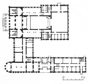 Будынак Рэспубліканскага Палаца піянераў і школьнікаў